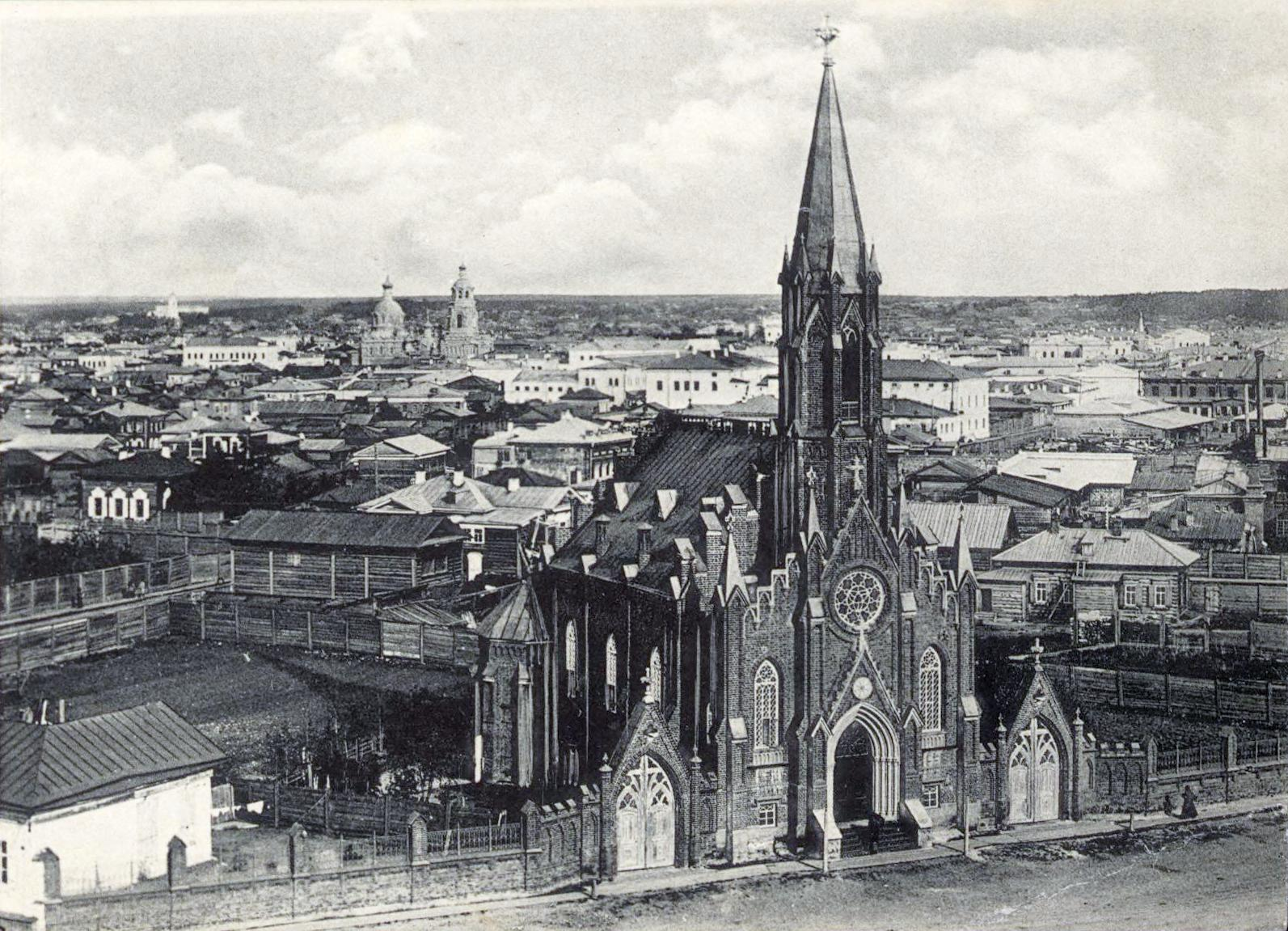 г. Иркутск. Католический костел. 1881-1885г. арх.И.Ф.(Юзеф)Тамулевич.